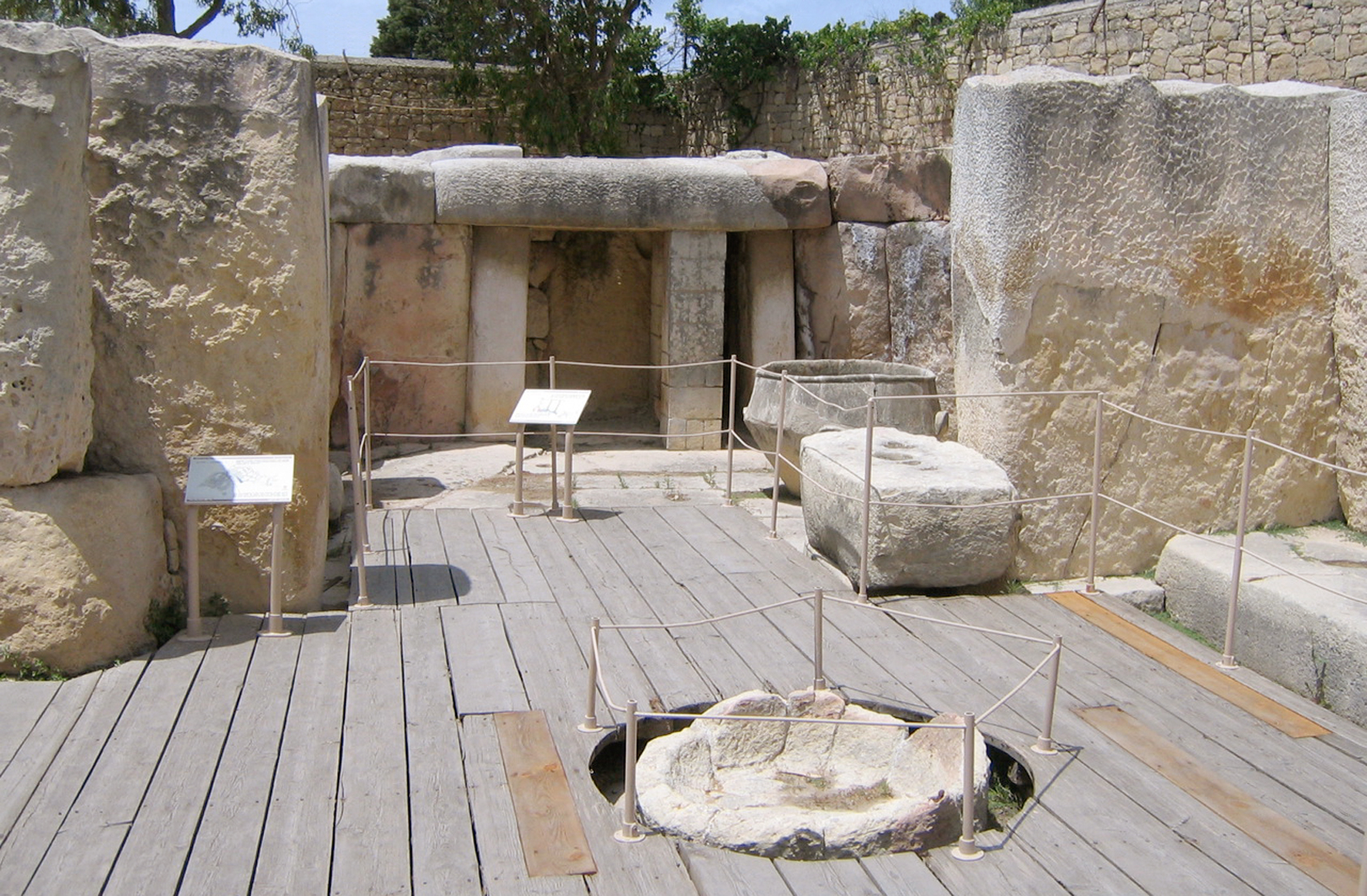 Tarxien temple, Malta